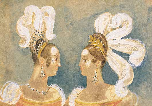 Dames de la Cour, Aquarelle, 9 x 13,3cm